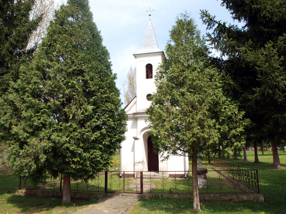 Crkva u selu Dubovik, Brodsko-posavska županija.